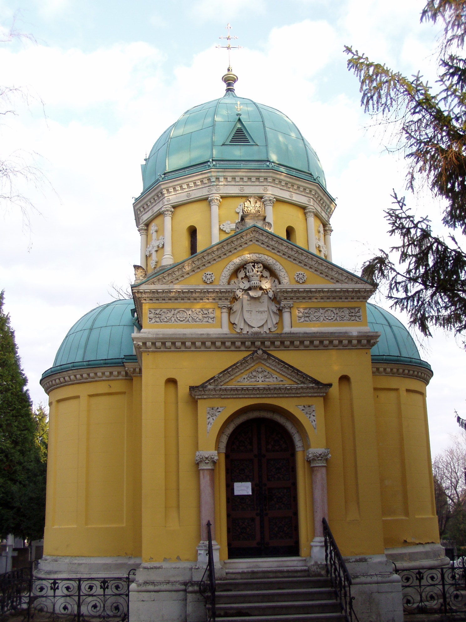 Часовня Петра и Павла на Мирогое в Загребе, Хорватия